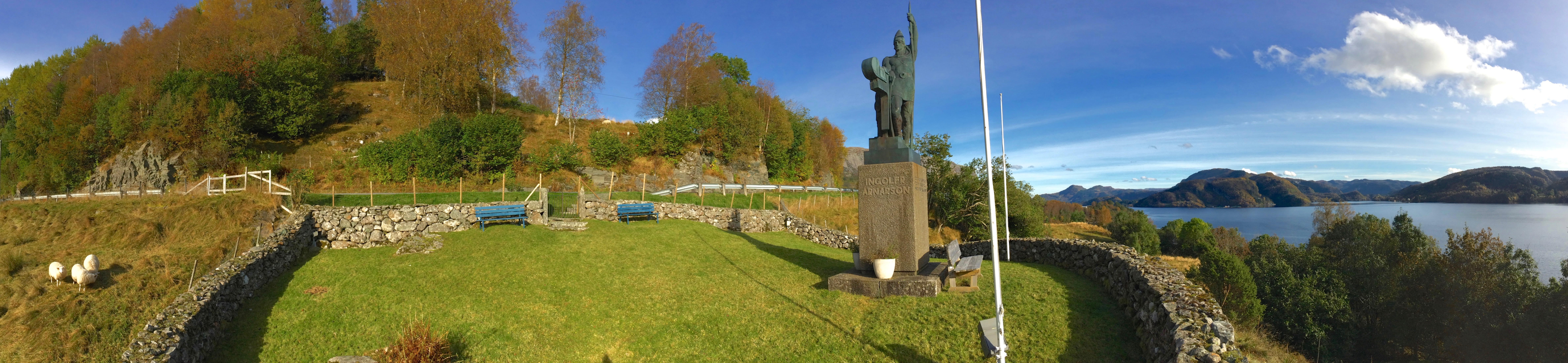 En kopi av Einarr Jonssons statue av Ingolf Arnarsson fra 1907 ble reist i 1961 i Rivedal ved Holmedal langs Fylkesveg 609 på nordsida av Dalsfjorden i Askvoll kommune i Sogn og Fjordane. Ingolf Arnarsson fra den vesle bygda Rivedal i Sunnfjord regnes som den første norrøne bosetteren på Island.NRK om Ingolfr Arnarson Forvridd, hakkete og sammenpresset panoramabilde 14. oktober 2015.